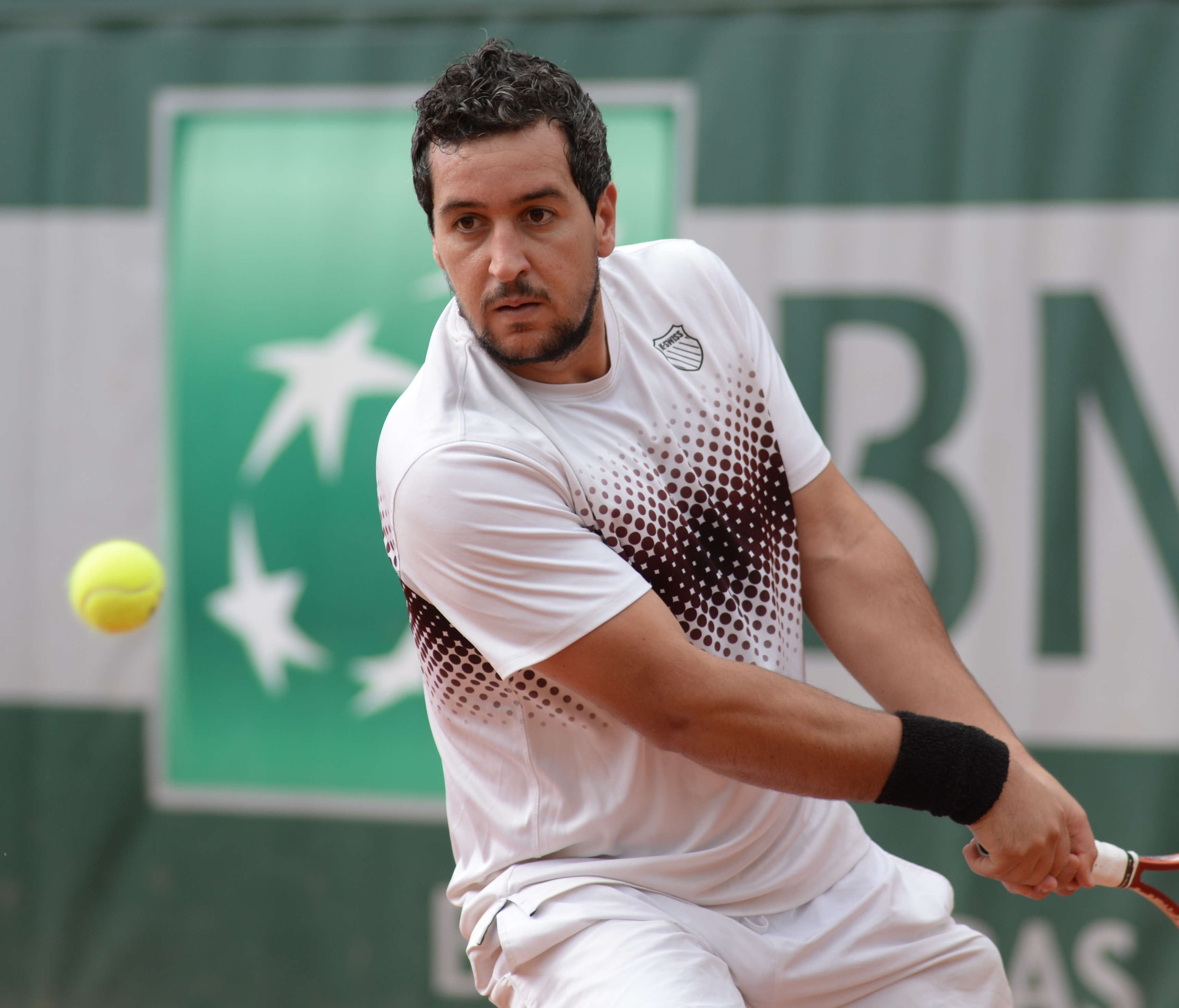 Lamine Ouahab